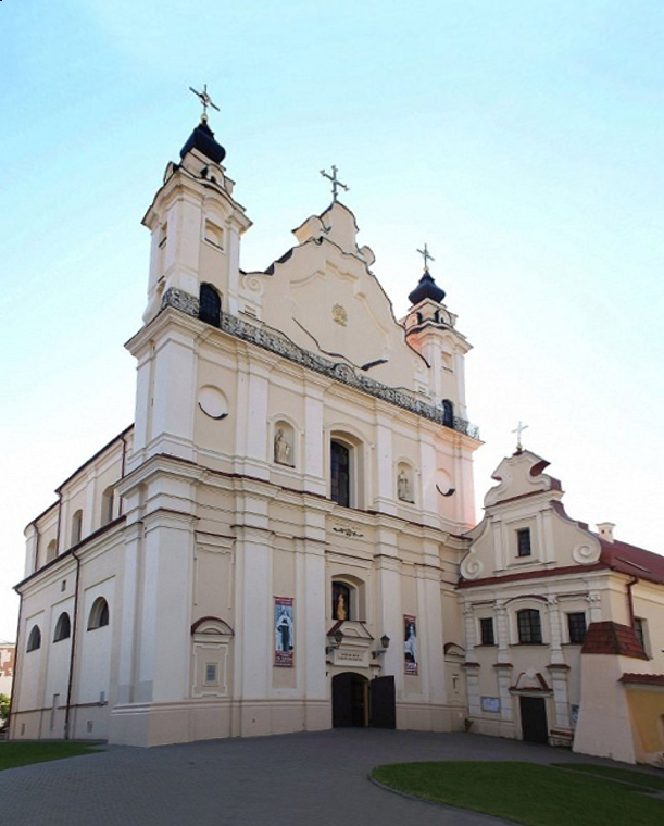 Цэнтр Пінска